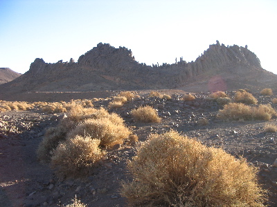 Sud de l'Algérie